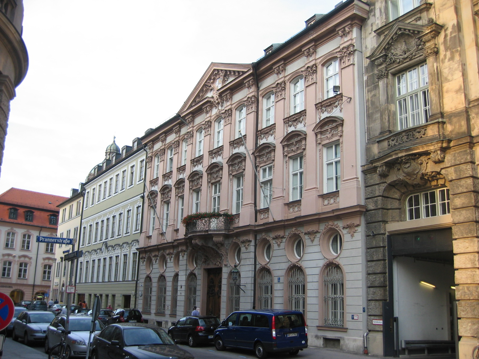 Palais Holnstein, Munich